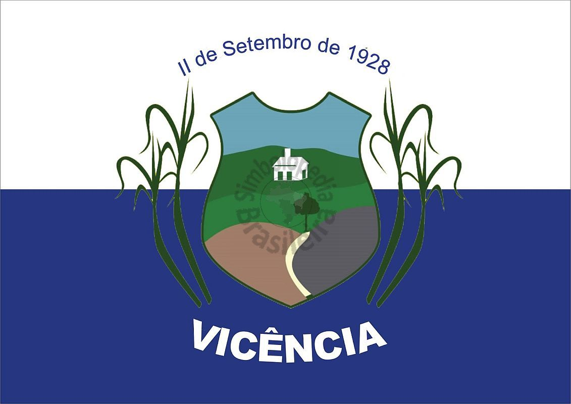 Brasão da cidade de Vicência A cidade está localizada no sul do estado de Pernambuco no Brasil